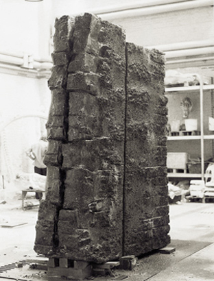 Skulptur von Klaus Müller-Klug